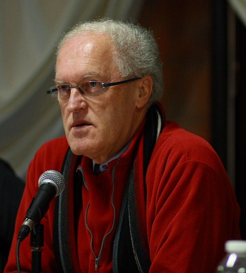 Jean-Claude Sandrier, Député du Cher.